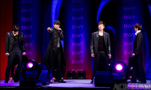 한국HP PSG 브랜드 마케팅 전략 발표회